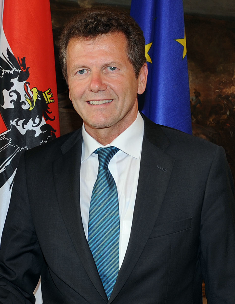 2012.gada 11.jūnijs. Saeimas priekšsēdētāja Solvita Āboltiņa Austrijas vizites ietvaros Vīnē tiekas ar Austrijas Ārlietu ministrijas valsts sekretāru Volfgangu Valdneru (Wolfgang Waldner). Foto: Austrijas parlaments